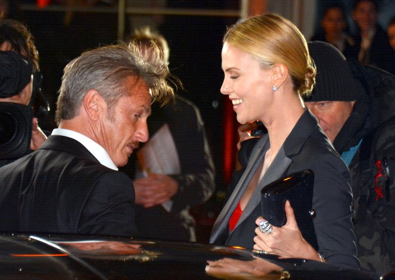 Sean Penn et Charlize Theron à la cérémonie des César